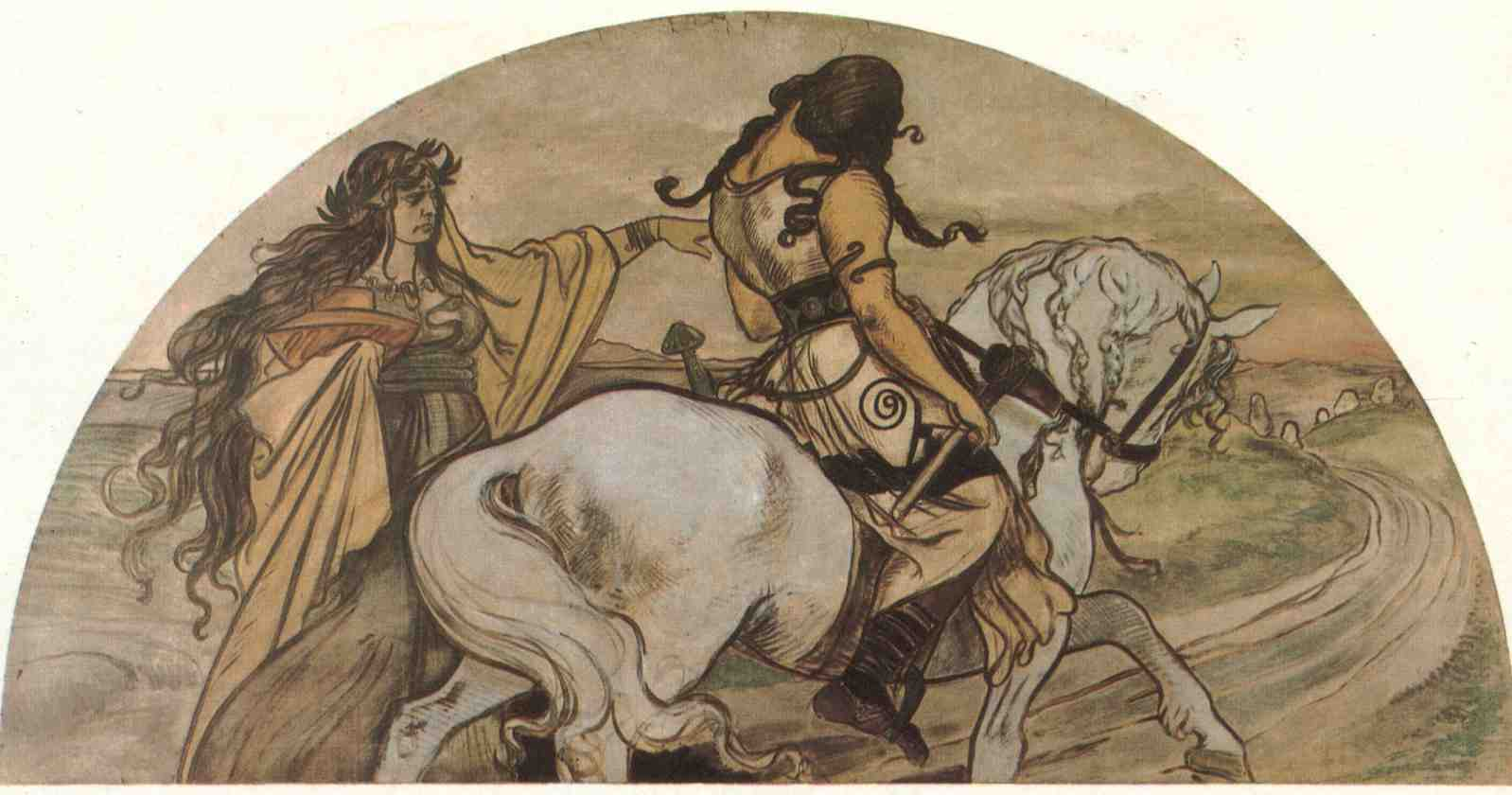 Mikoláš Aleš: Žalov. Závěrečný obraz z 12 lunet cyklu Vlast, který byl určen pro výzdobu interiéru Národního divadla. Na tomto obraze bohyně Morana posílá hrdinu na věčnost. Obrazy Aleš tvořil v době pobytu na Brandejsově statku v Suchdole, od nějž není daleko tehdejší obec s názvem Žalov. V Alšem užité mytologii se Žalov nazývá místo, kde spí věčným spánkem všichni hrdinové. Obecně se předpokládá, že obraz skutečně zobrazuje krajinu v okolí Žalova ([1])..